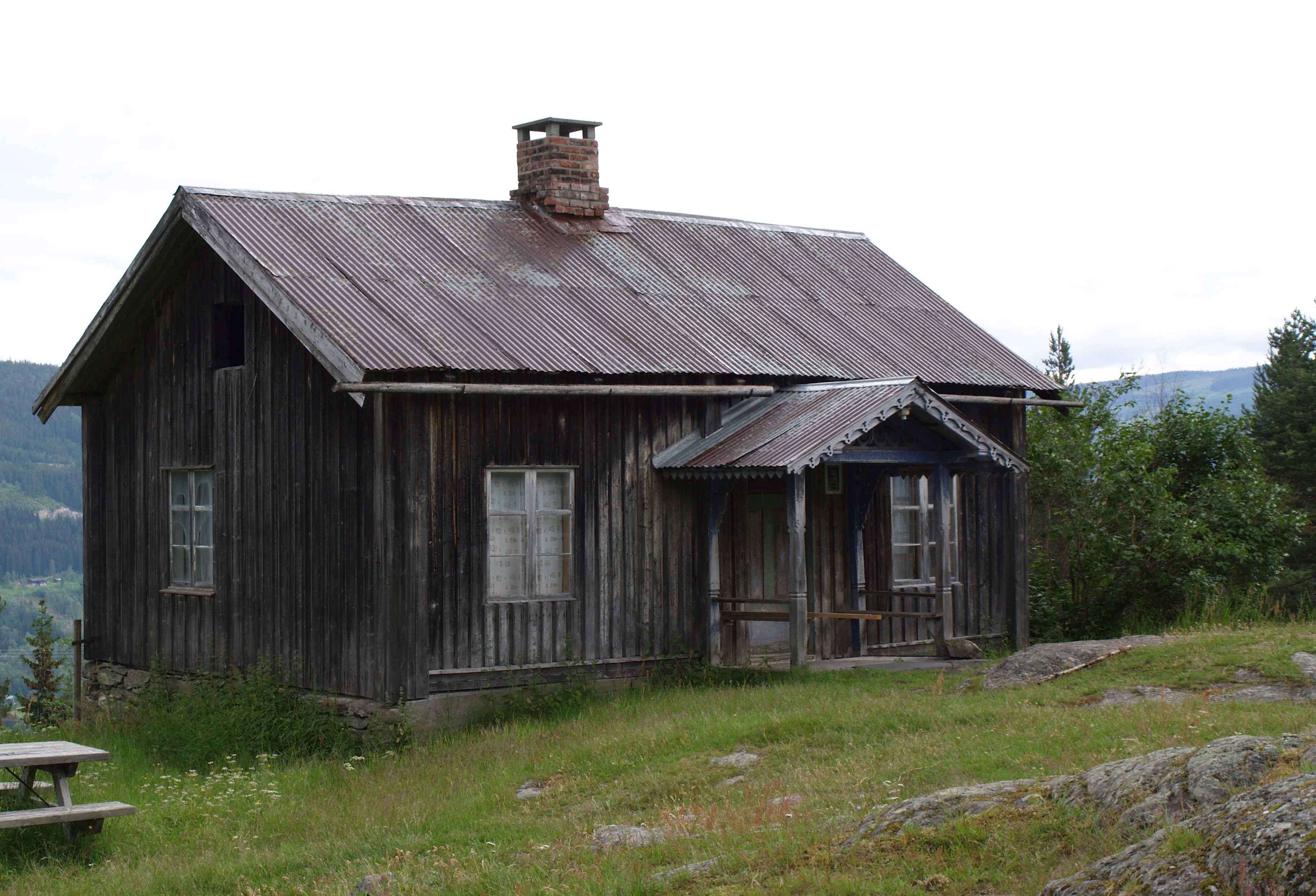 Bagnsbergatn gård, Sør-Aurdal. See Kampen om Bangsbergatn gård.